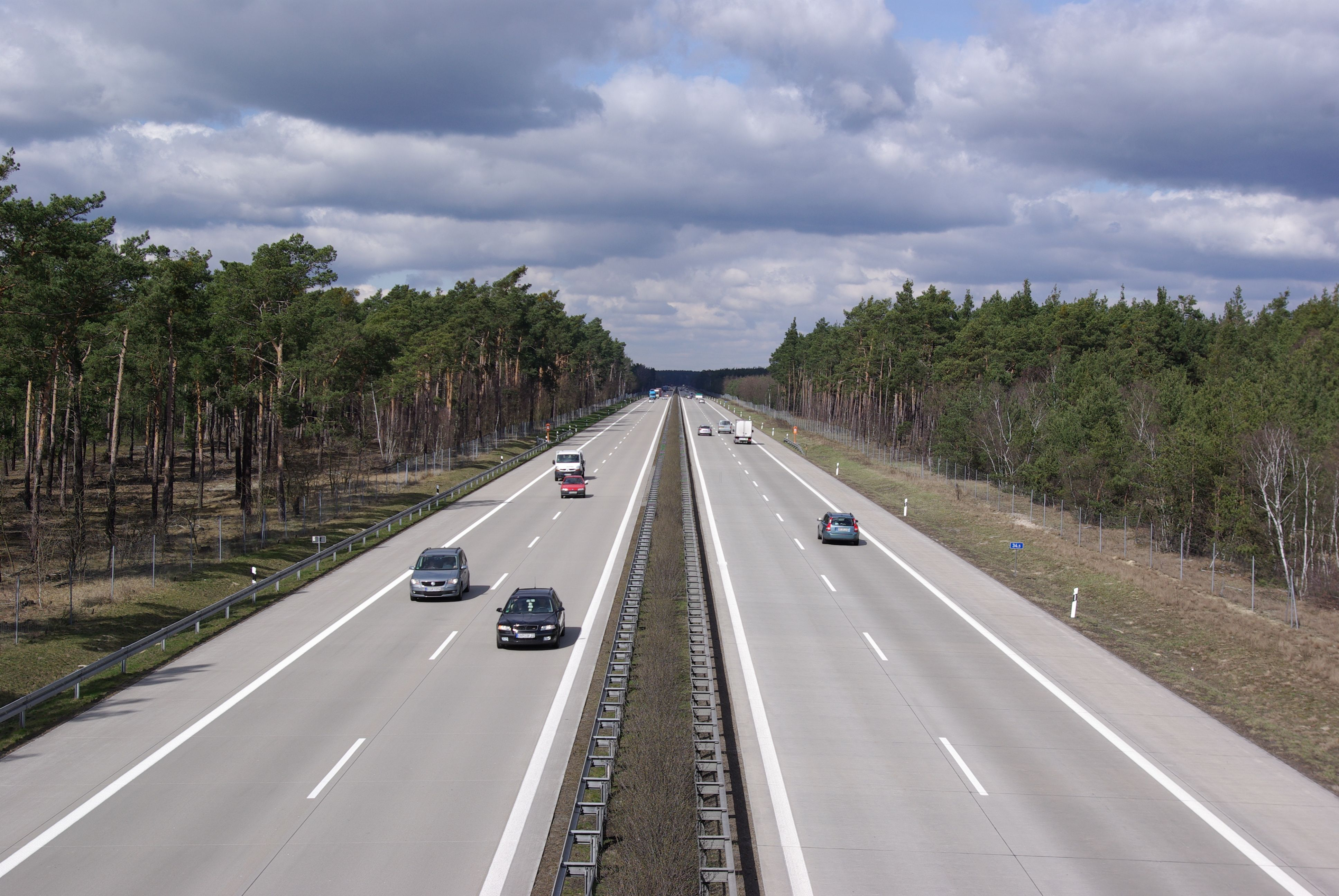 Die Autobahn A13 in Brandenburg, Deutschland. Der Blick geht nach Norden in Richtung Anschlußstelle Baruth/Mark.